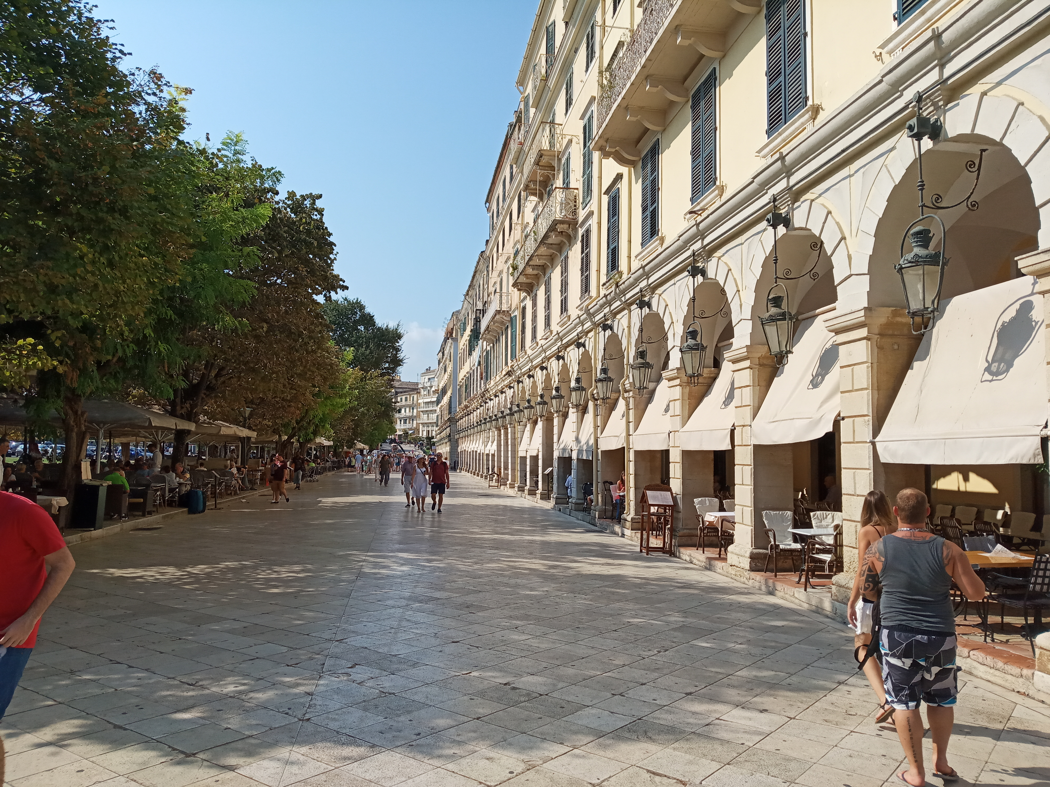 Квартал Лістон Корфу, Керкіра